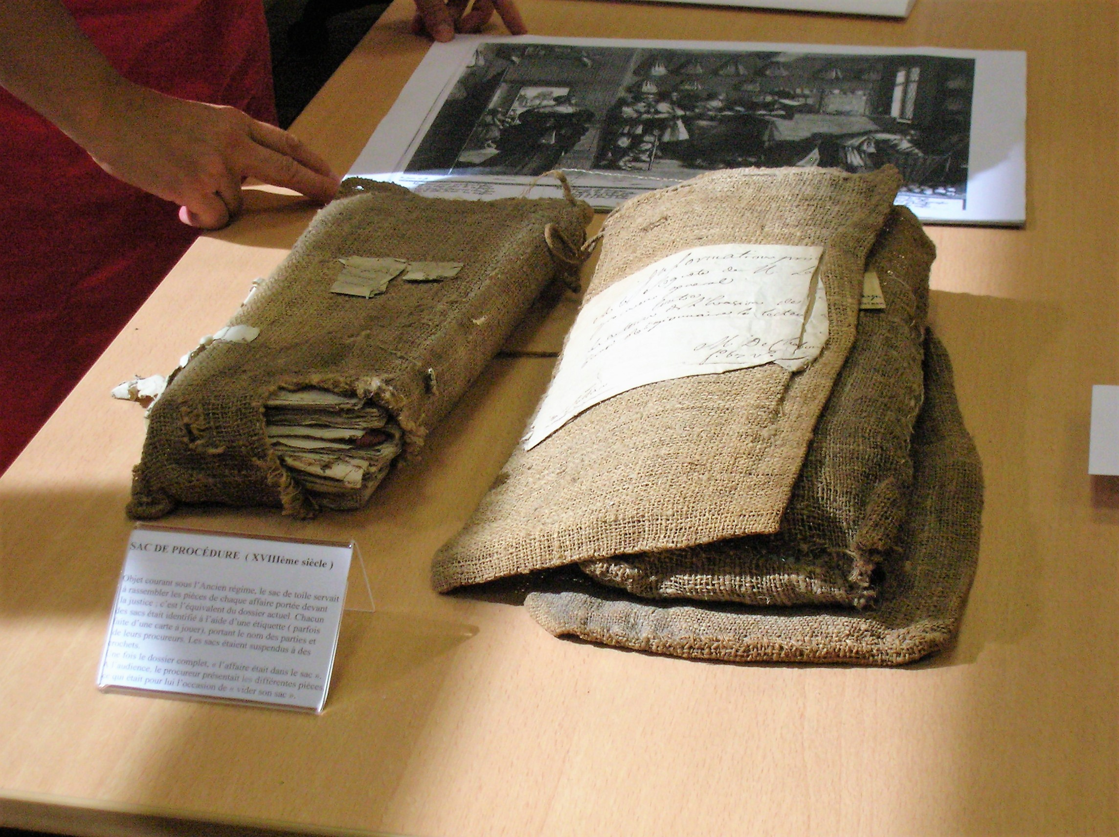 Sac de procédure du XVIIIème siècle. Ouverture au public des Archives départementales de l'Isère à l'occasion des Journées du Patrimoine 2015. Visite guidée.